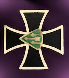 Panssaridivisioonan jatkosodan muistoristi